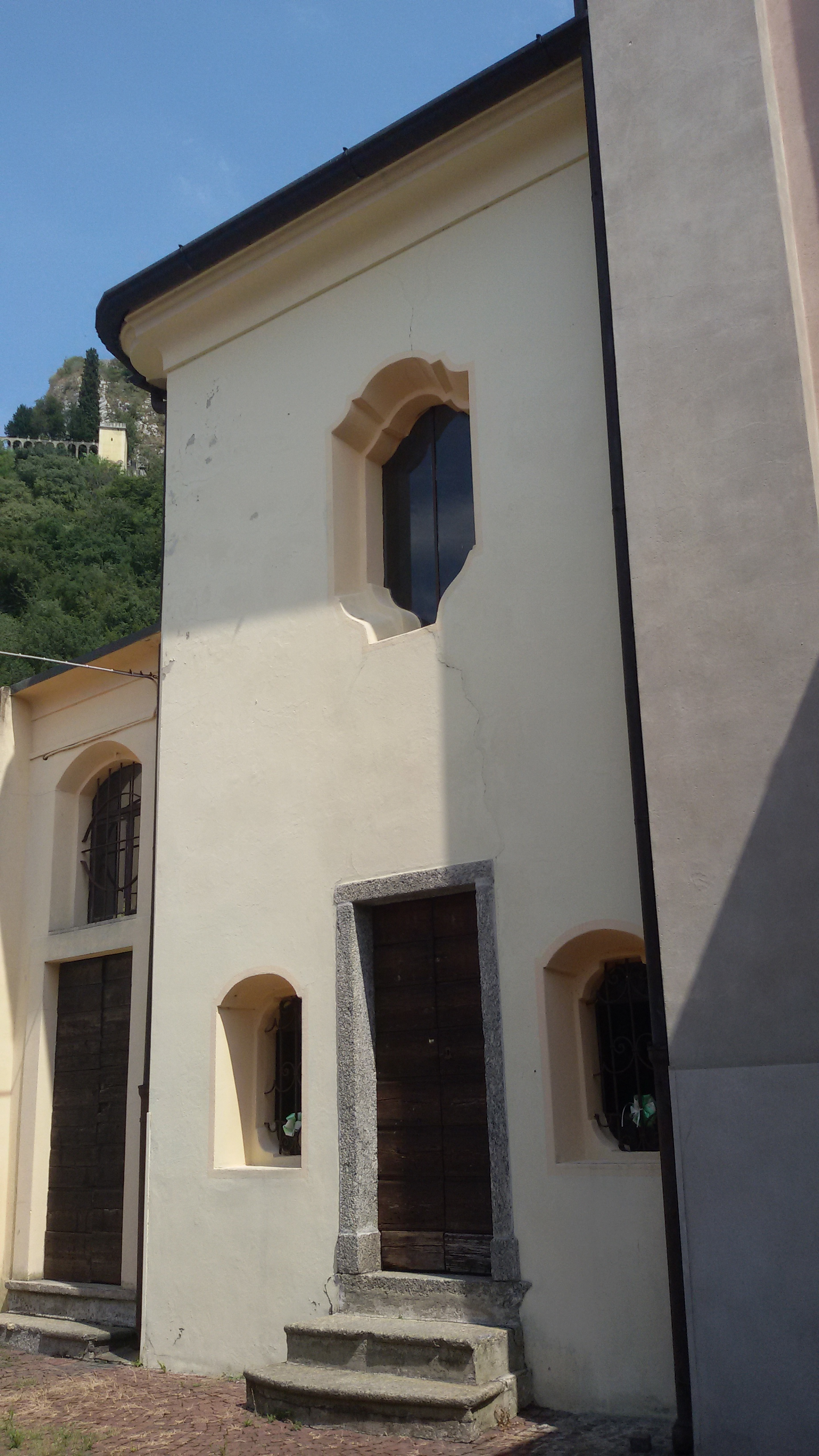 Cappella dedicata alla Madonna di Lourdes Chiesa parrocchiale Santi Gervasio e Protasio Vercurago